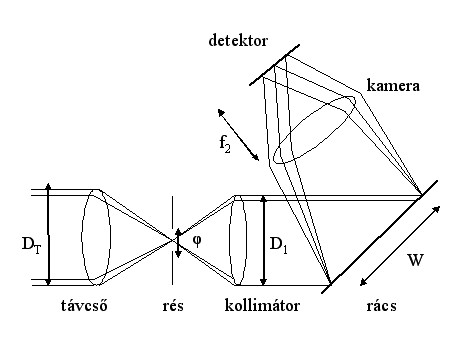 A spektrográf egységei Created by Dorottya Szam